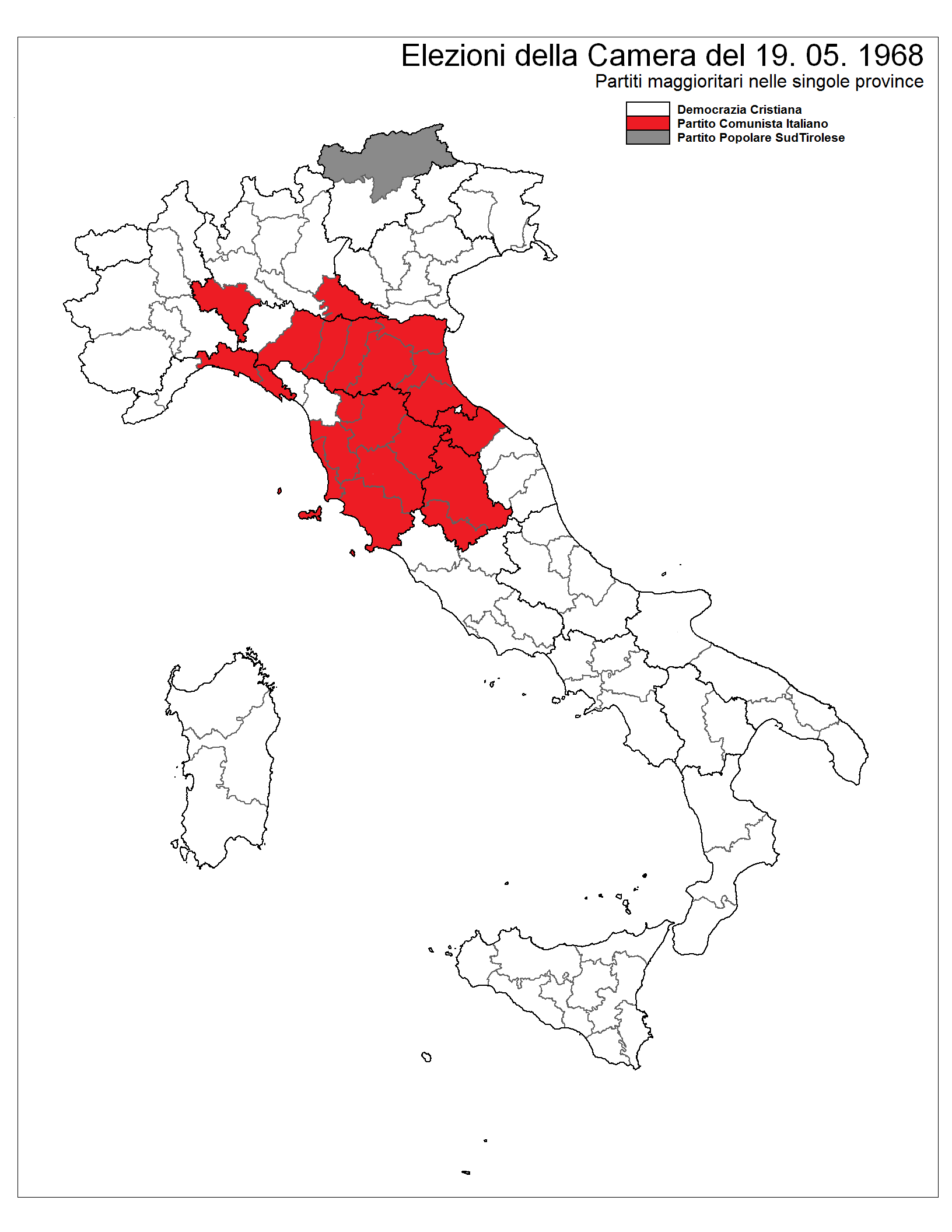 Partiti maggioritari nelle province, voto 1968